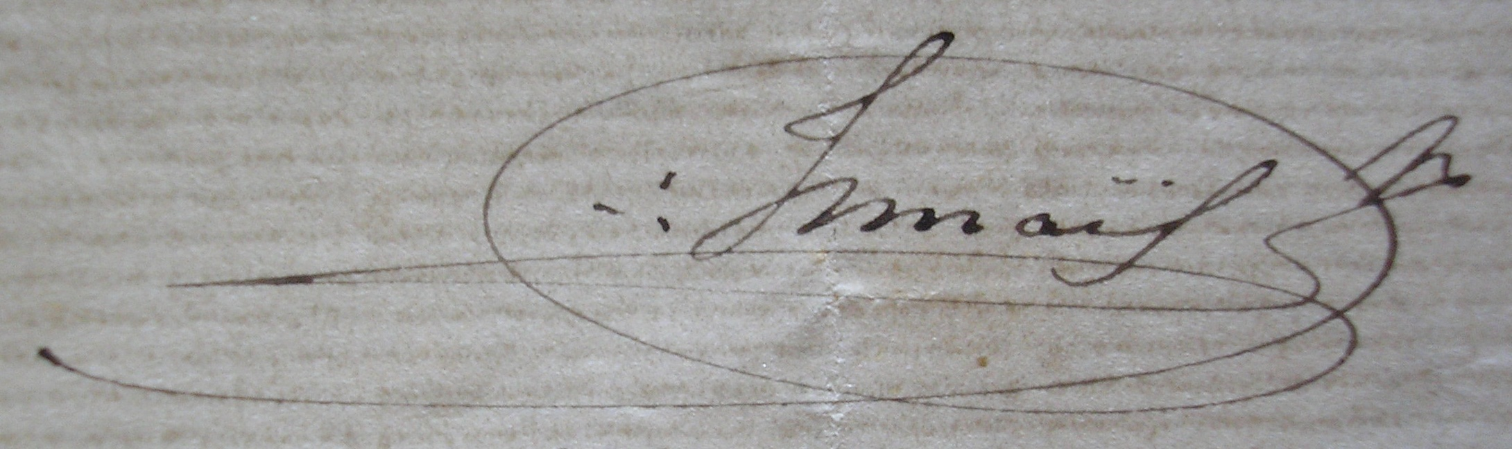 Echange de courrier de 1862 fournissant un autographe et un paraphe d'Ismaël. La paraphe daté du 8 juillet 1862 est muni des "trois points" pouvant indiquer une appartenance d'Ismaël à la franc-maçonnerie.